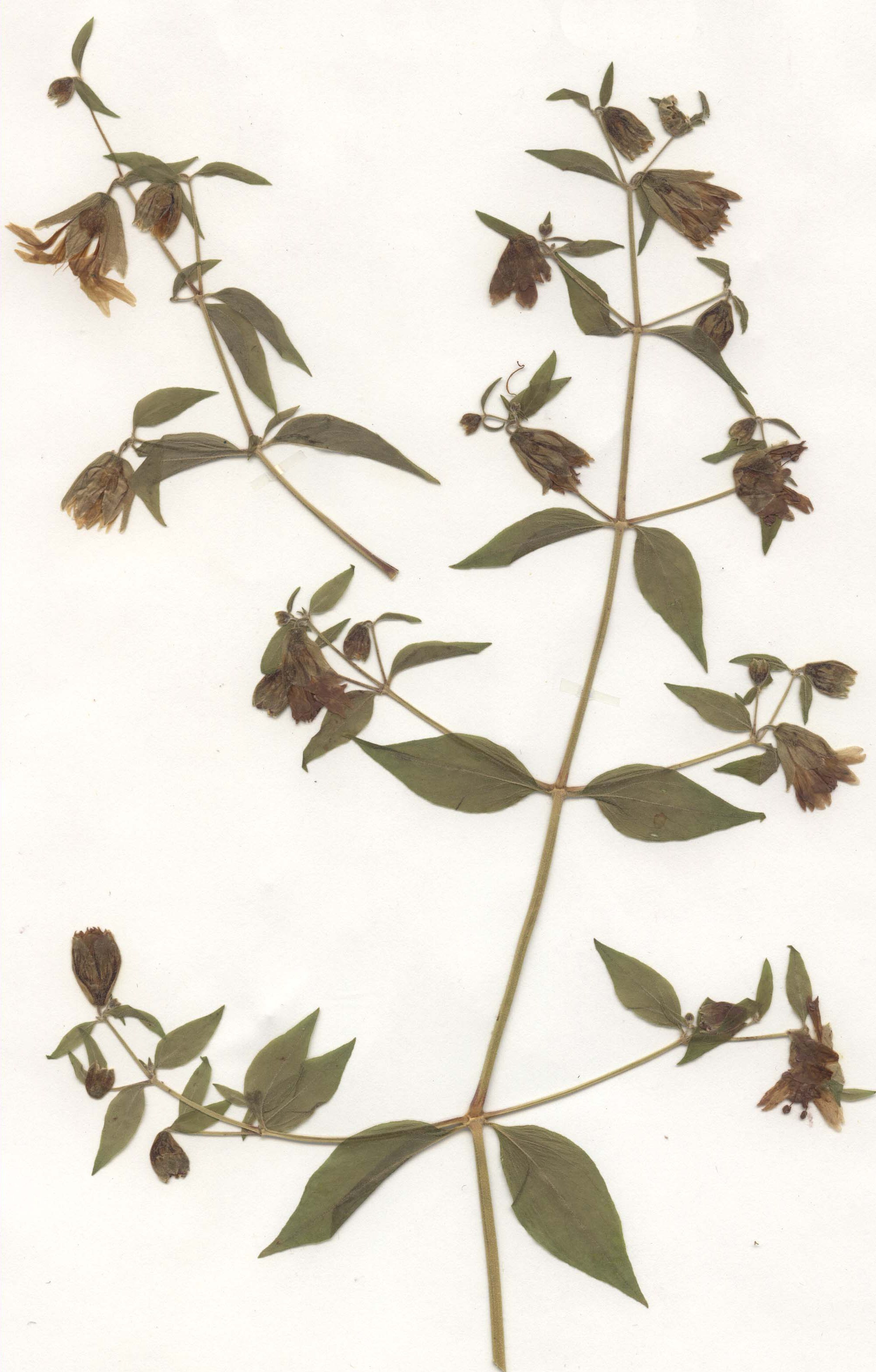 Cucubalus baccifer, eigener Herbarbeleg von 1986, Unterfranken